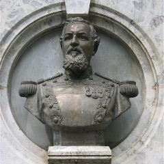 Foto tomada por el autor al monumento a los Mártires de Uruapan — General Carlos Salazar Ruiz.